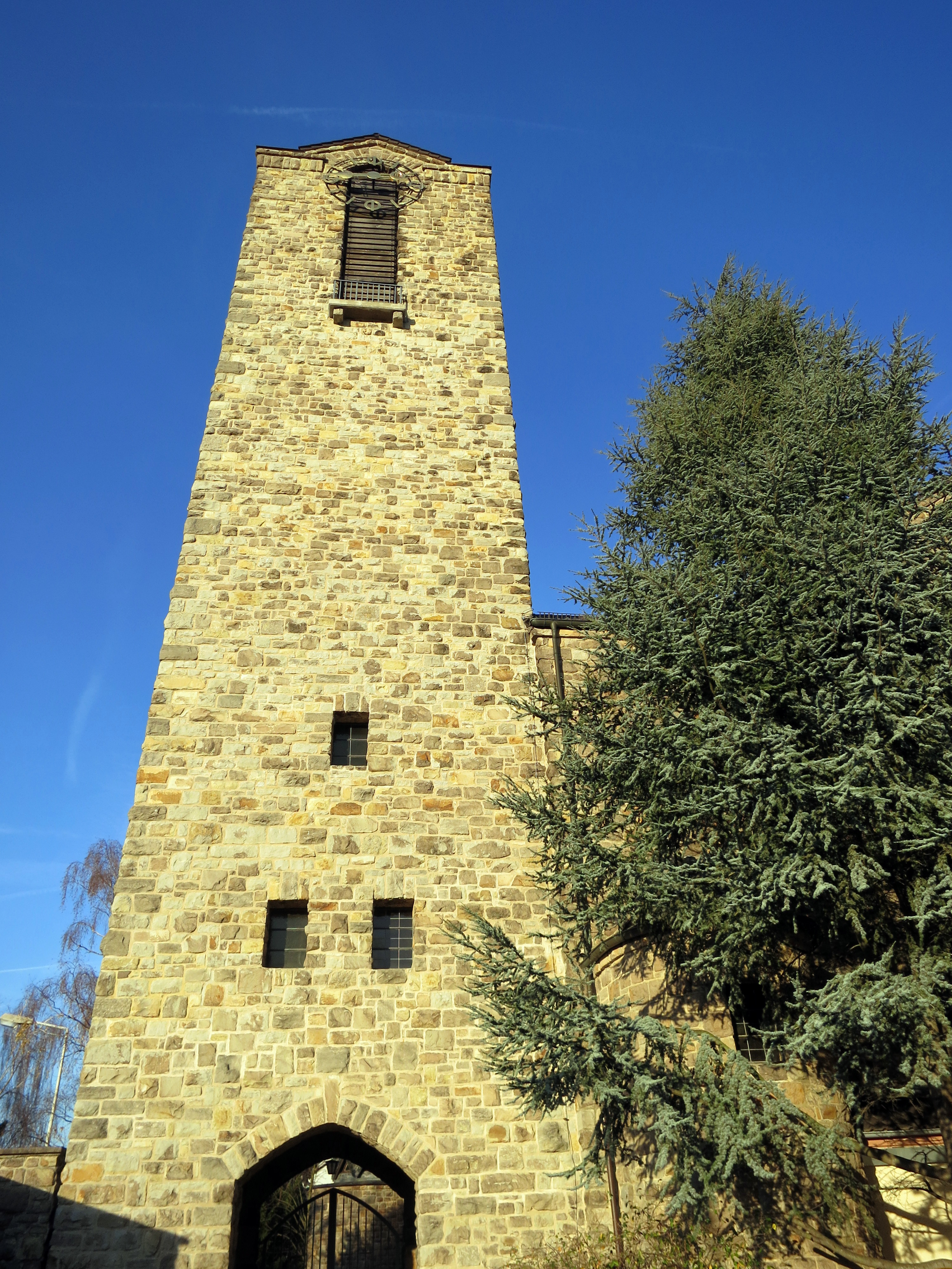 Glockenturm